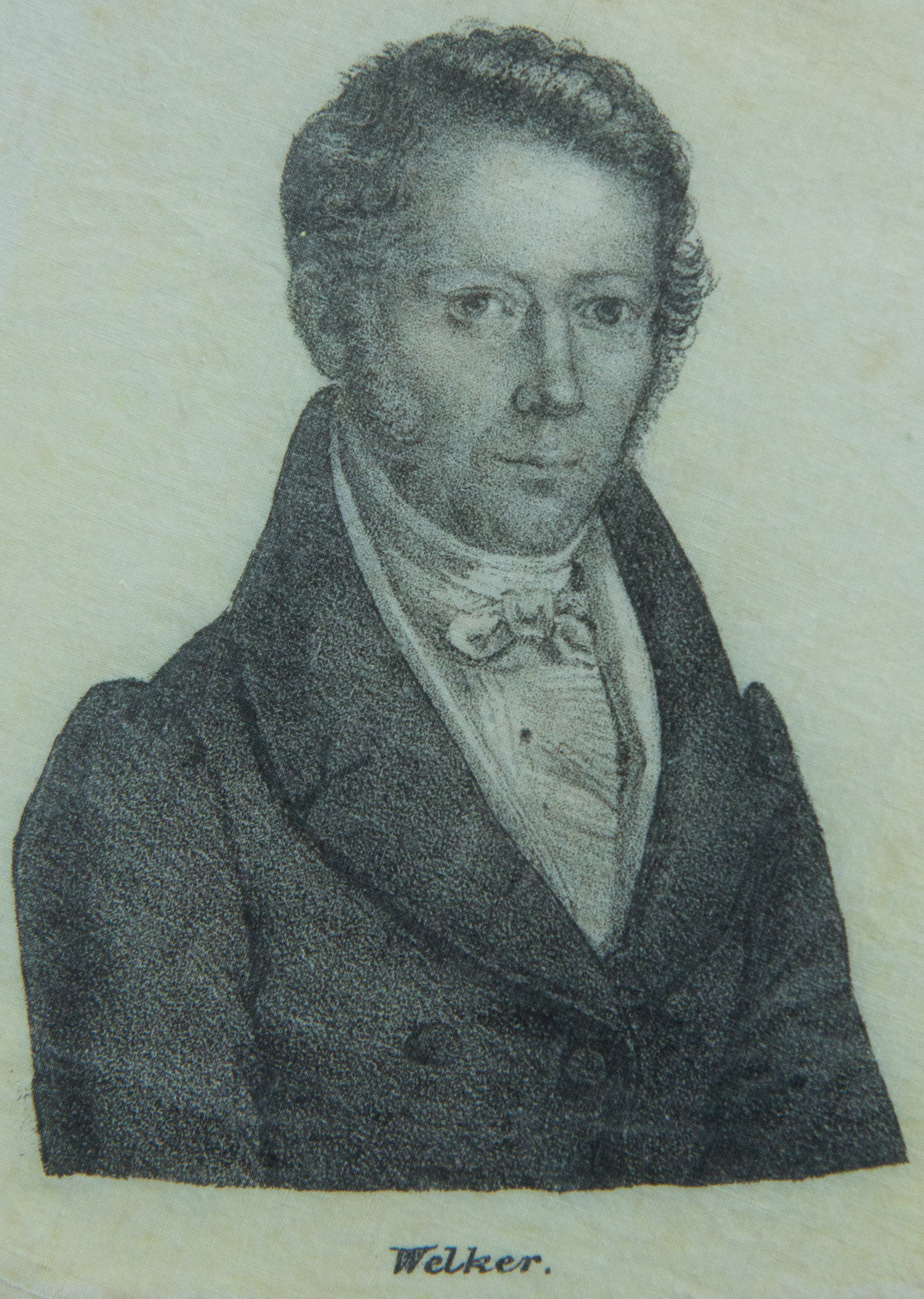 Hambacher Tuch, fotografiert im Archiv des Liberalismus in Gummersbach: Carl Theodor Welcker (1790-1869)